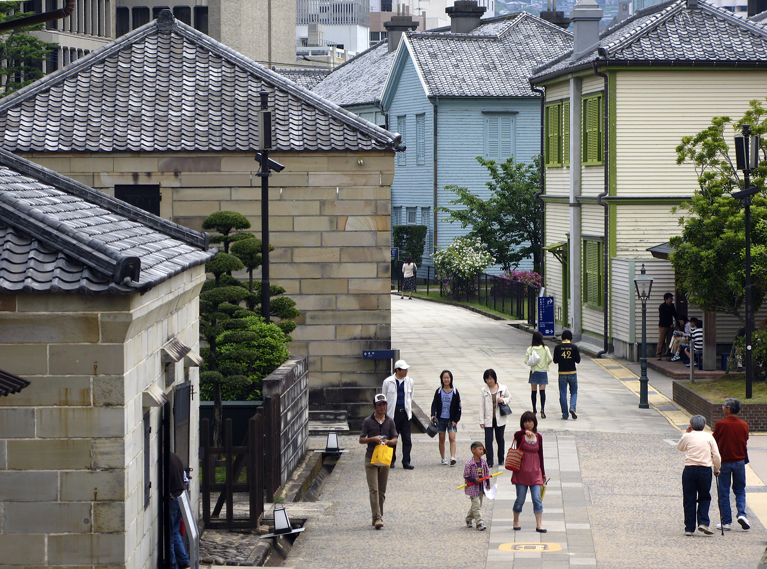 Dejima in Nagasaki, Japan